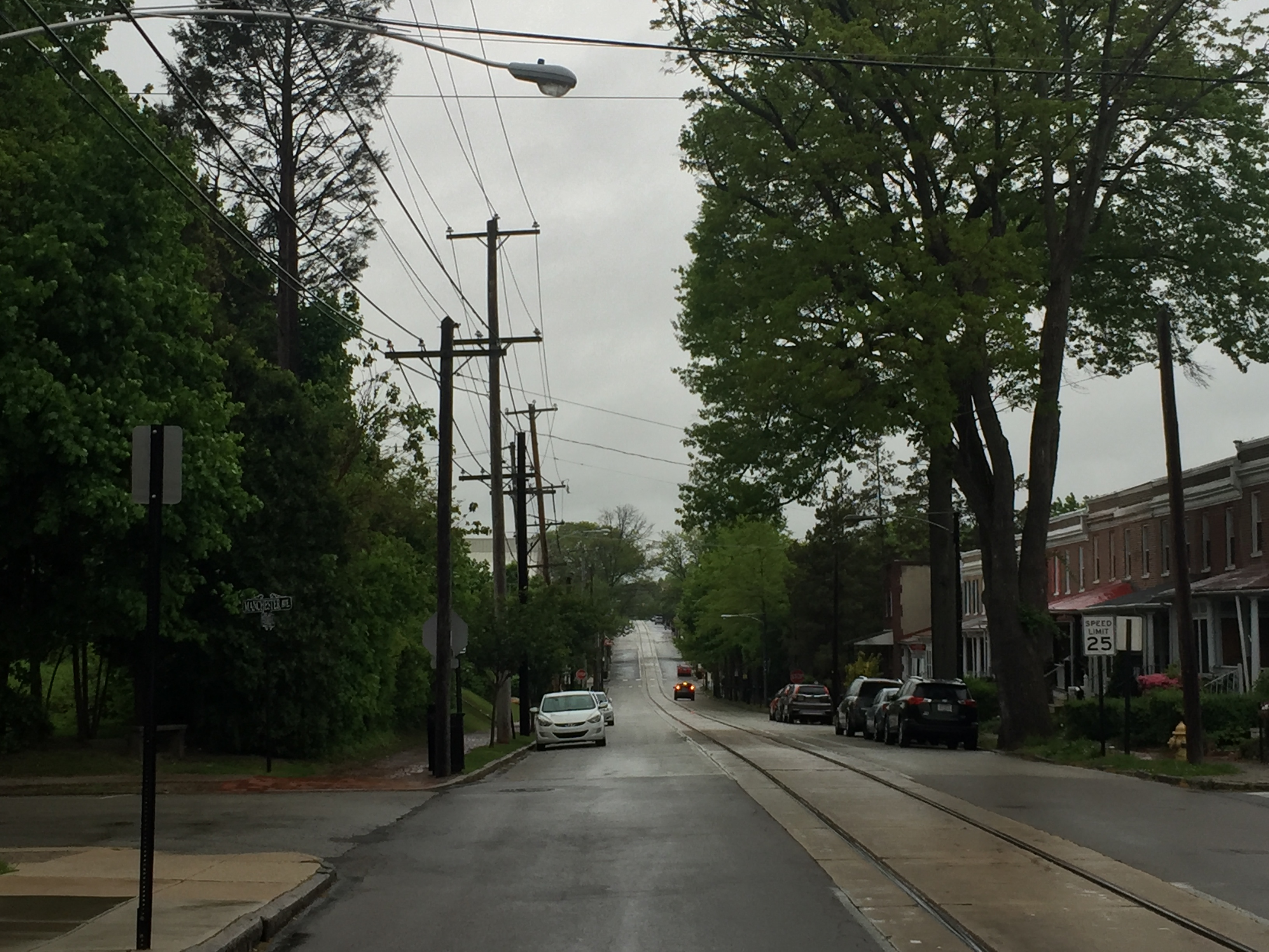 Manchester Avenue station